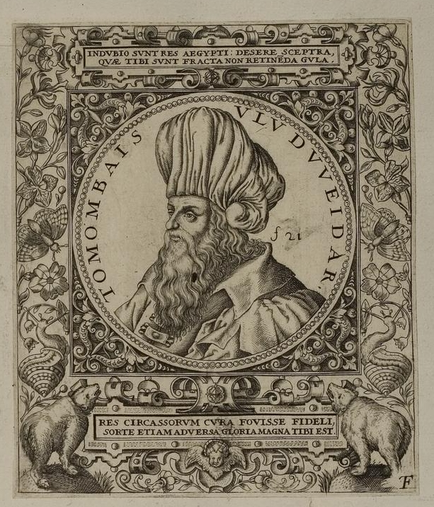 Grafik aus dem Klebeband Nr. 1 der Fürstlich Waldeckschen Hofbibliothek Arolsen Illustration aus: Georg Greblinger: Wahre Abbildungen der Türckischen Kayser vnd Persischen Fürsten / so wol auch anderer Helden und Heldinnen von dem Osman / biß auf den andern Mahomet. Johann Ammon, Frankfurt 1648 Motiv: "Tomombais Ulu Duveidar" (= Tuman Bay)